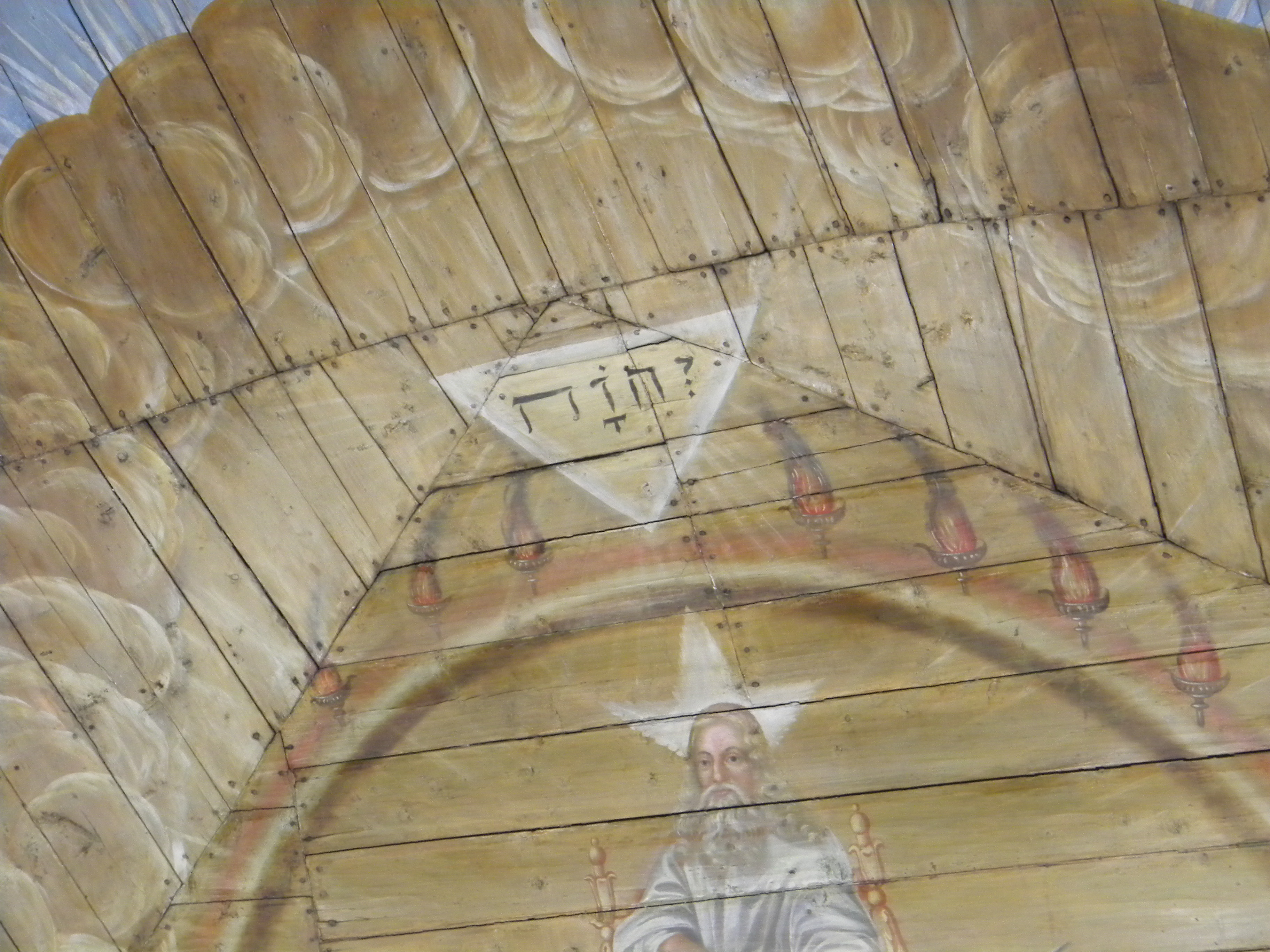 Takmålning i Kungälvs kyrka med tetragrammet JHWH. Takmålning utförd 1697-1698 av Erik Eriksson Grijs (1650-1720).